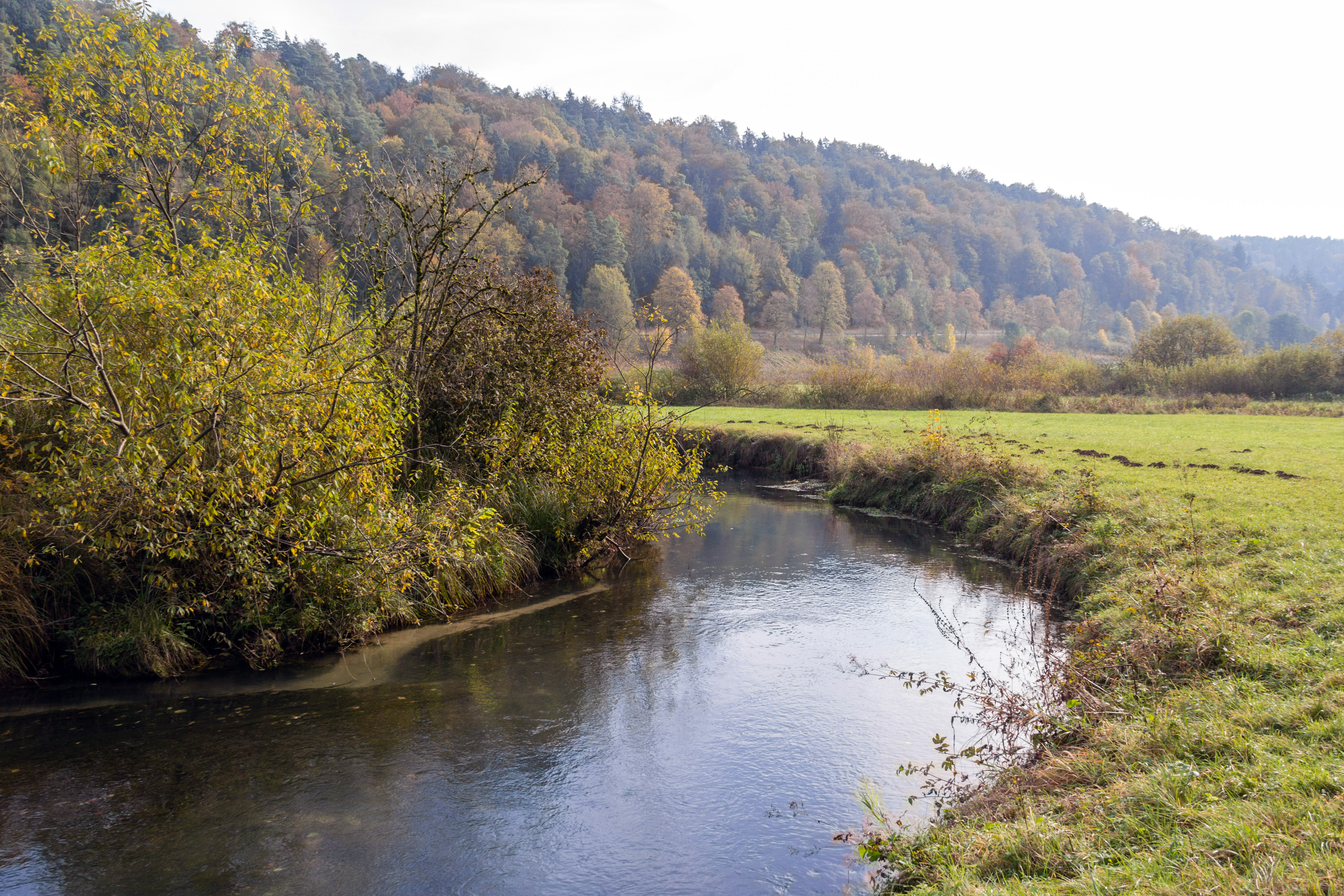 Breitenbrunner Laber bei Breitenbrunn, Breitenbrunn, LSG Schutzzone im Naturpark Altmühltal